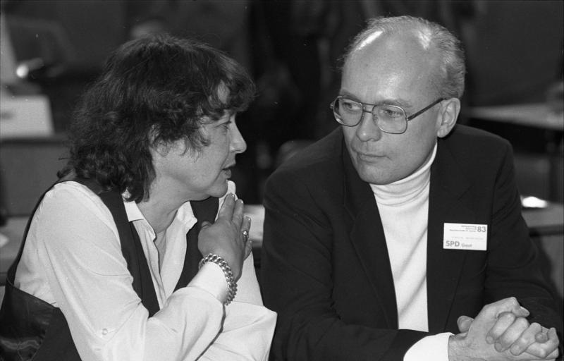 22.1.1983 SPD-Wahlparteitag in der Dortmunder Westfalenhalle